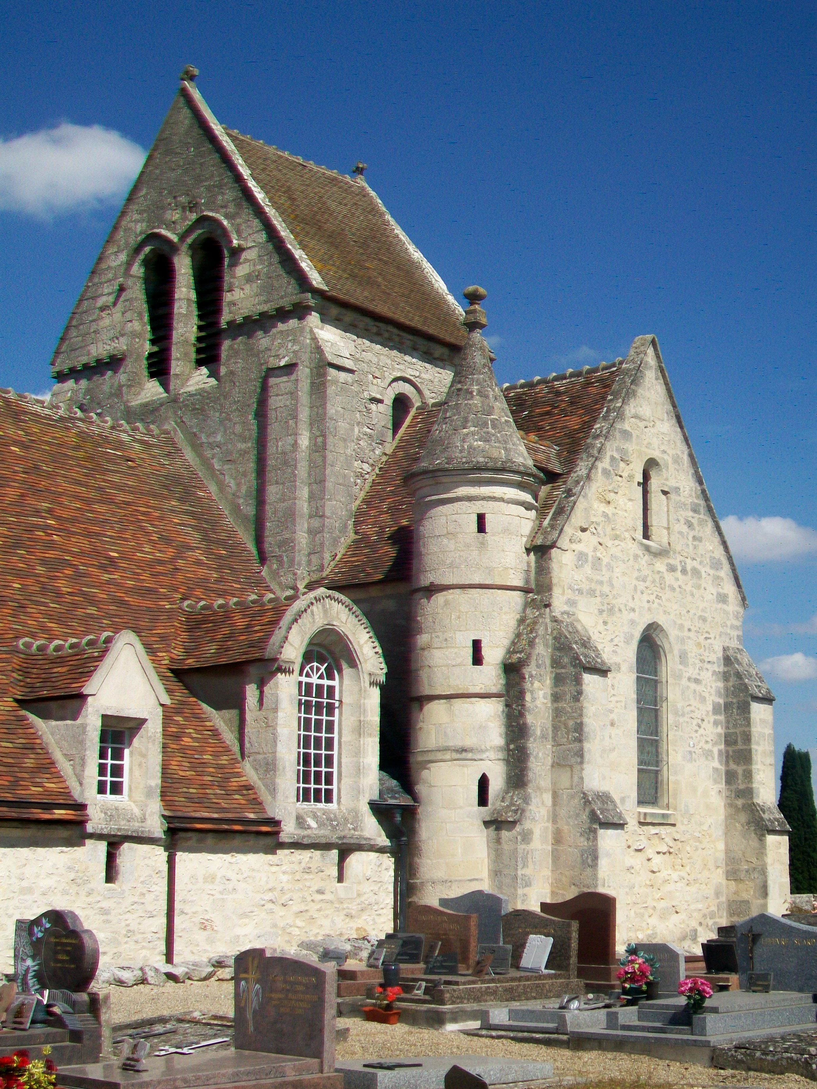 Le clocher, la tourelle d'escalier et le transept sud.